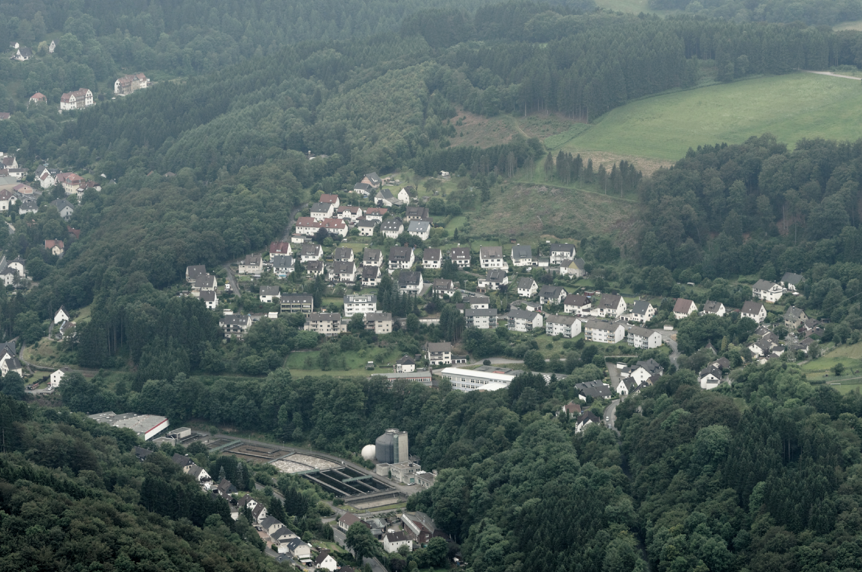 Fotoflug Sauerland Nord. Altena-Altroggenrahmede, Klärwerk im Rahmedetal an der Landesstraße 530, Blickrichtung West The making of this document was supported by the Community-Budget of Wikimedia Germany.